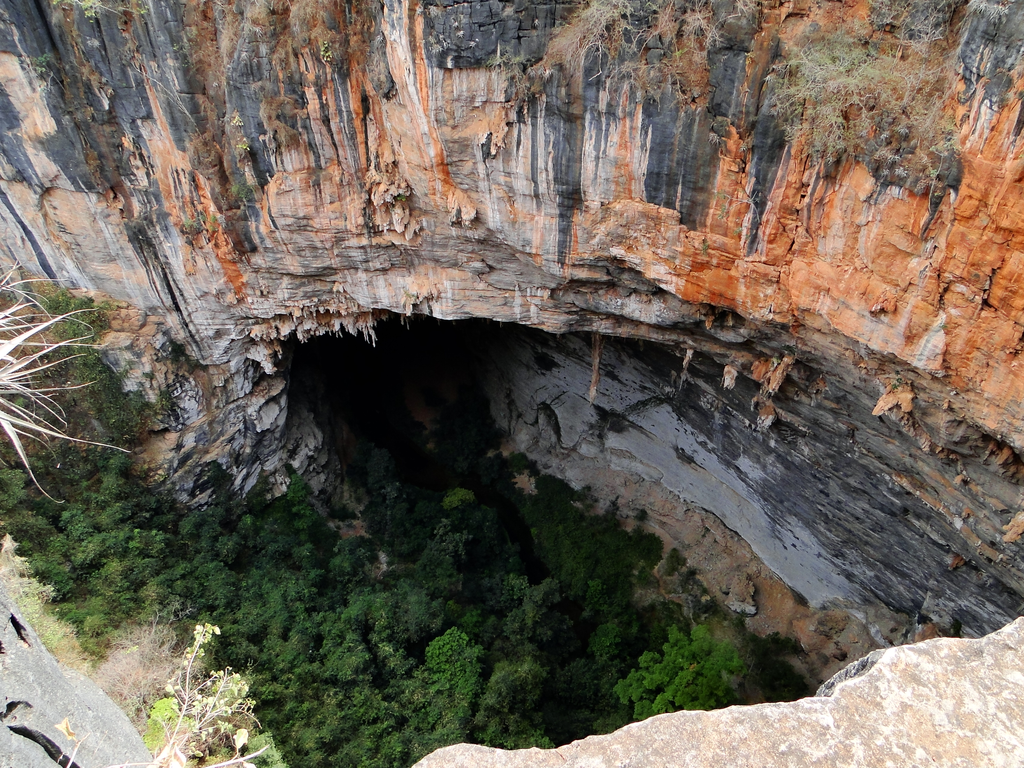 Clássica forma de um relevo cárstico. Uma dolina forma-se pelo fato da rocha ser dissolvida pela água em subsuperfície tornando o terreno instável. Isso propicia a abertura da depressão, claro, ao longo de milhares, ou quiça, milhões de anos! Do ponto de visada do fotografo até o fundo da depressão são aproximadamente 180 m.